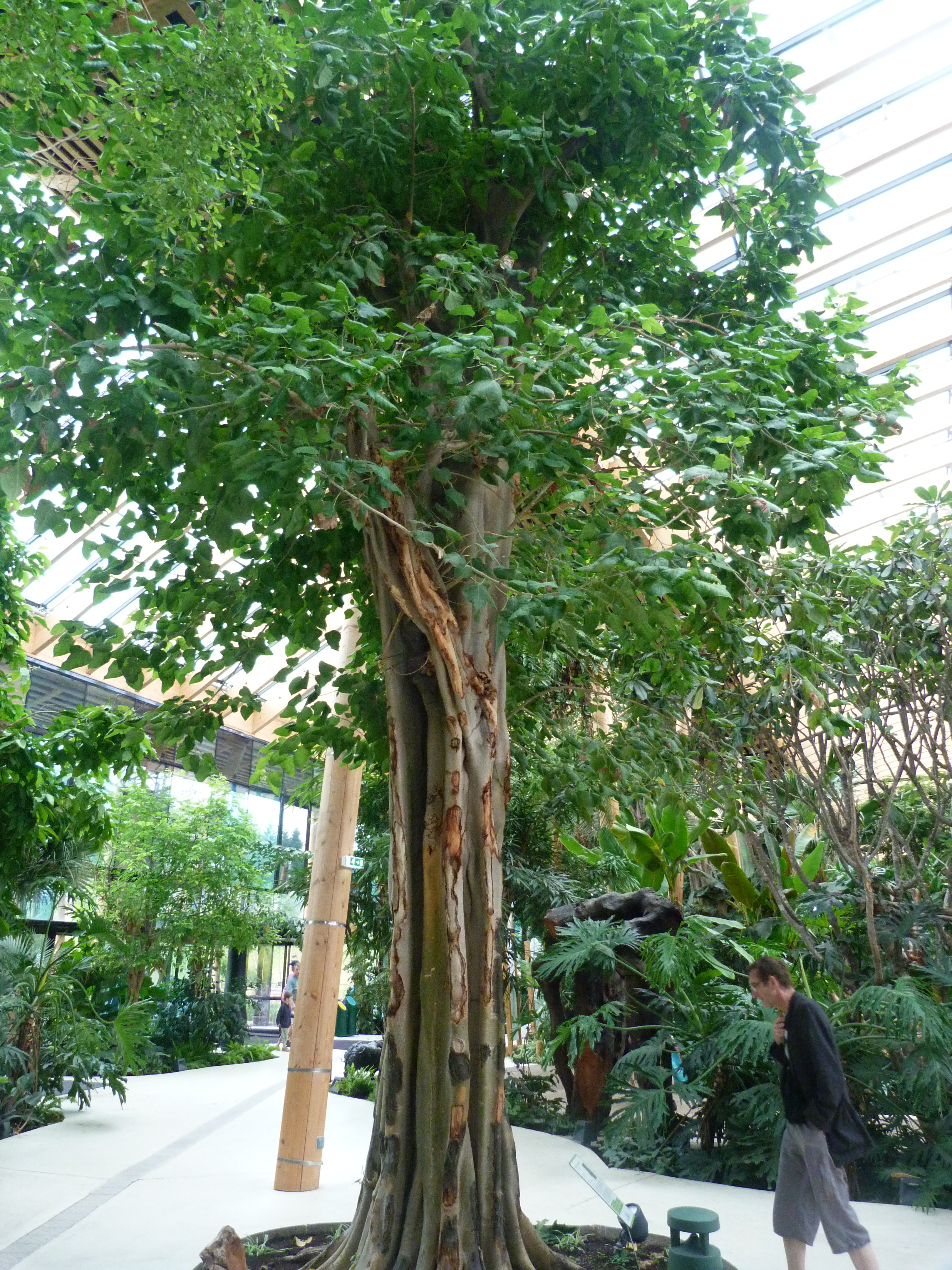 Ficus religiosa serre à Hattigny